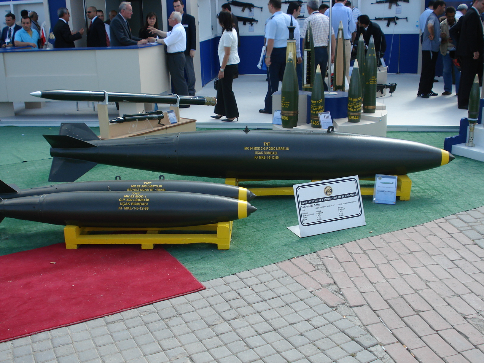 IDEF '07 Savunma Fuarı'nda çekildi. MK-84, MK-82 .23 Mayıs 2007